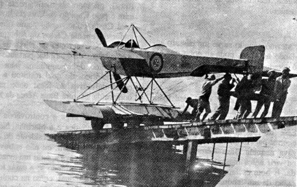 Hidroplano Borel da Marinha do Brasil, posteriormente, em 1919, doado à Polícia Militar do Paraná